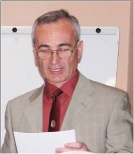 Dr. Estref Myftari